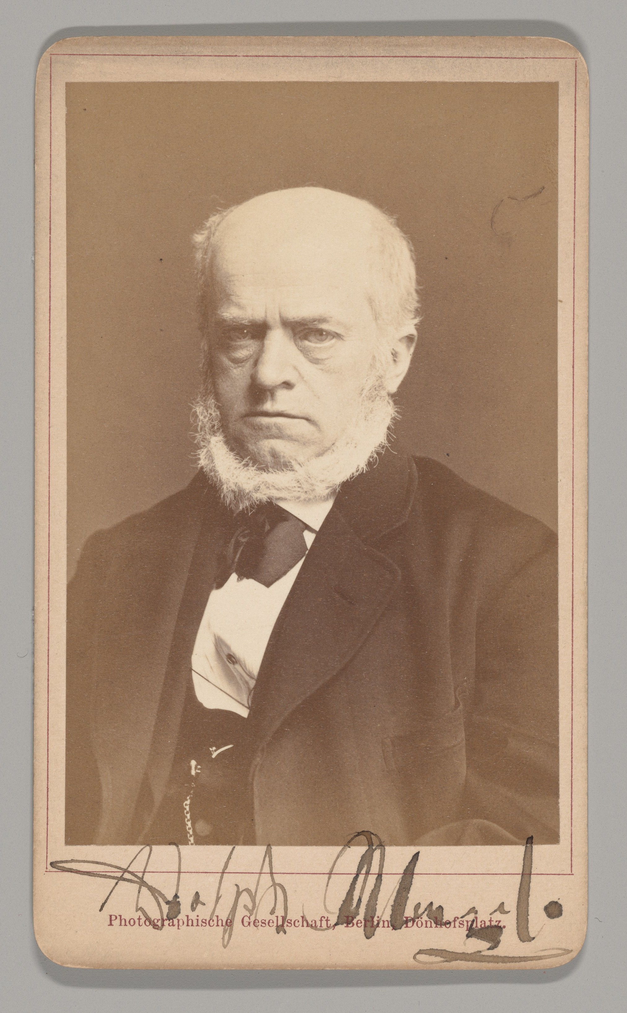 Carte-de-visite; Photographs